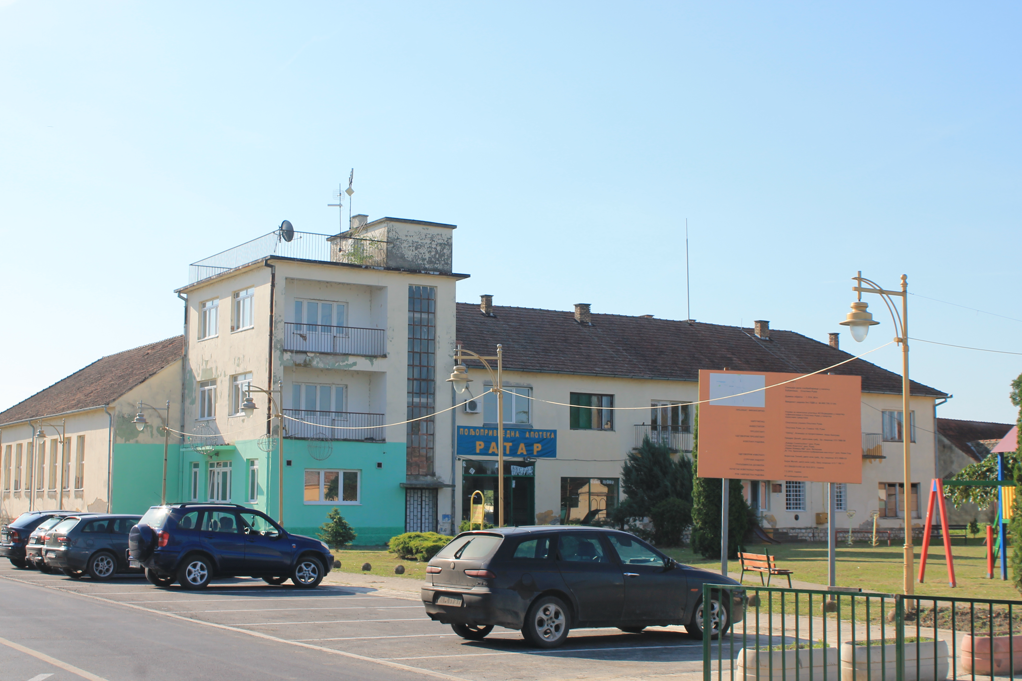 Buđanovci